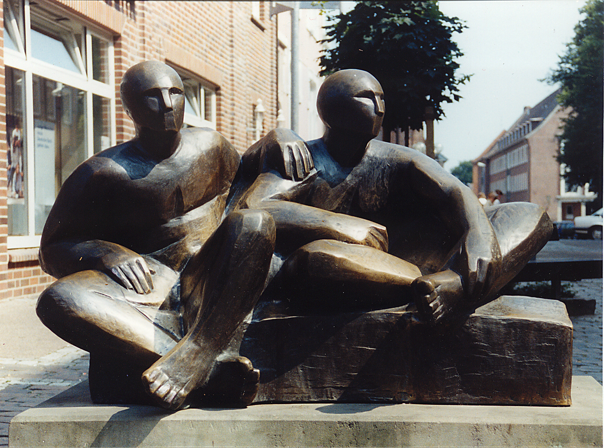 Die Wachenden, eine frühe Arbeit von Carsten Eggers aus dem Jahr 1986